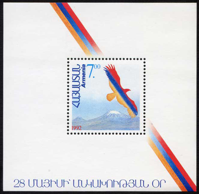 Почтовый блок Армении, 1992 год